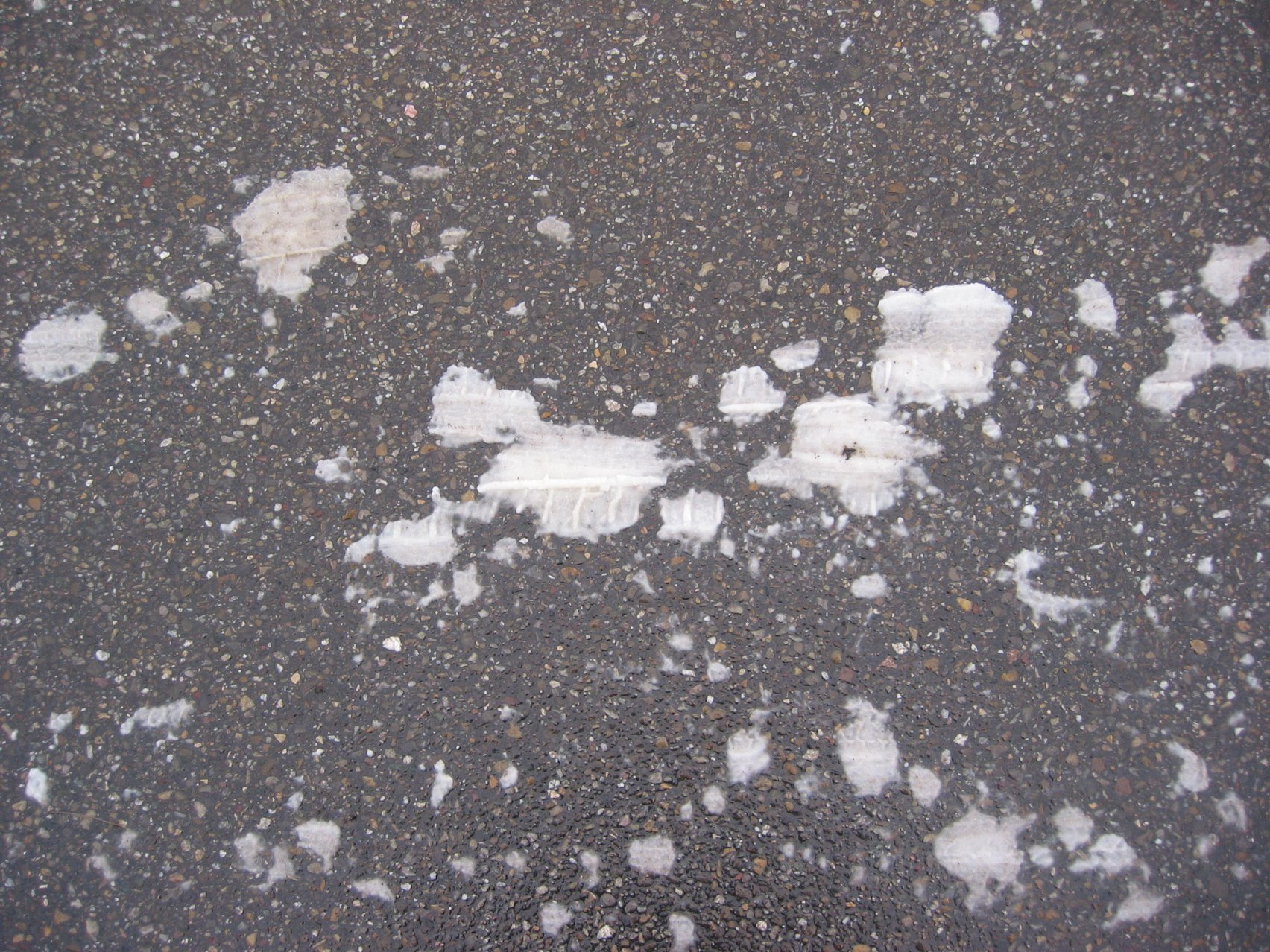 (Strooizout op wegdek) salt on pavement